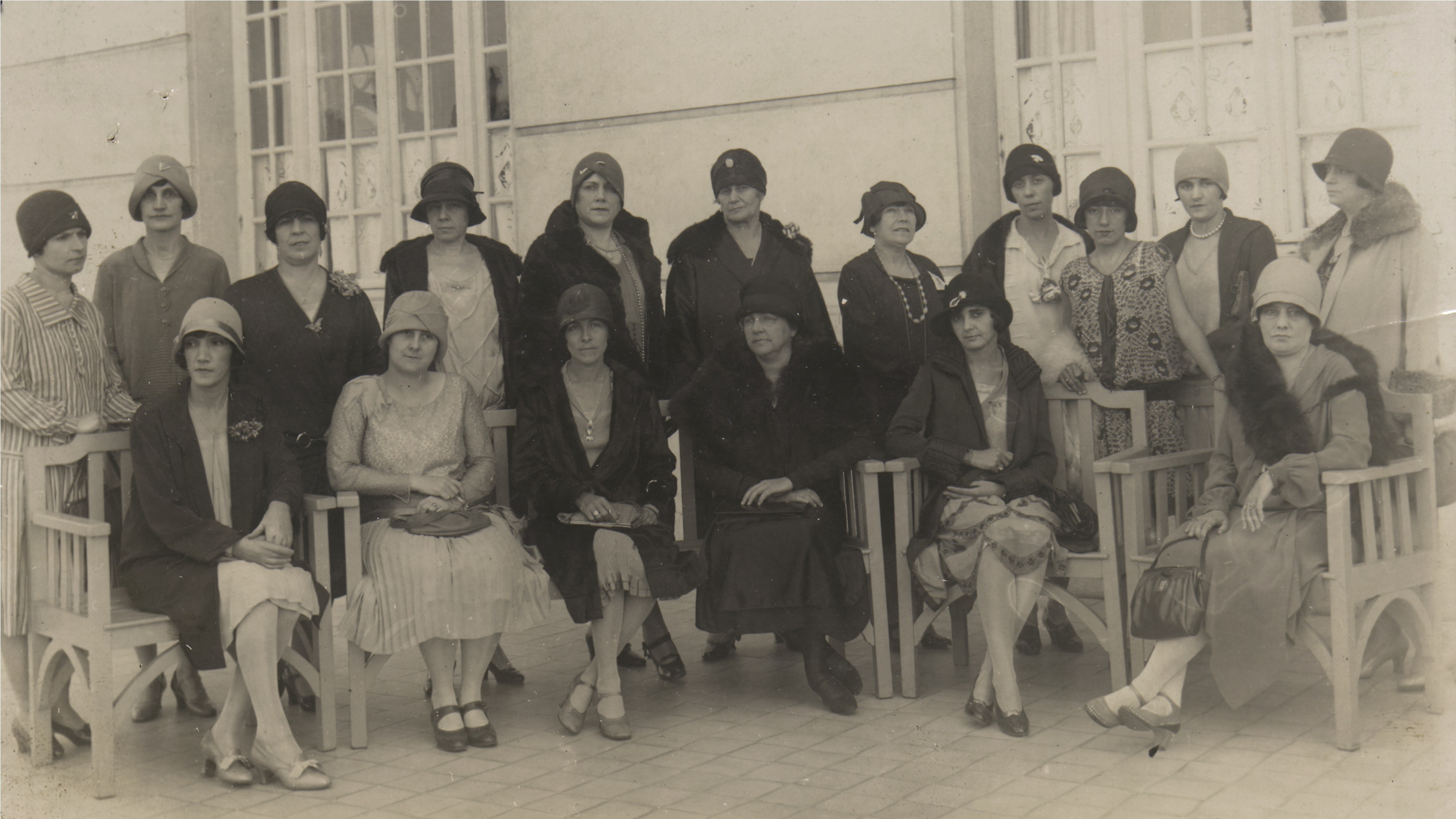 Integrantes da Federação Brasileira para o Progresso Feminino – FBPF. Fundo: Federação Brasileira pelo Progresso Feminino.